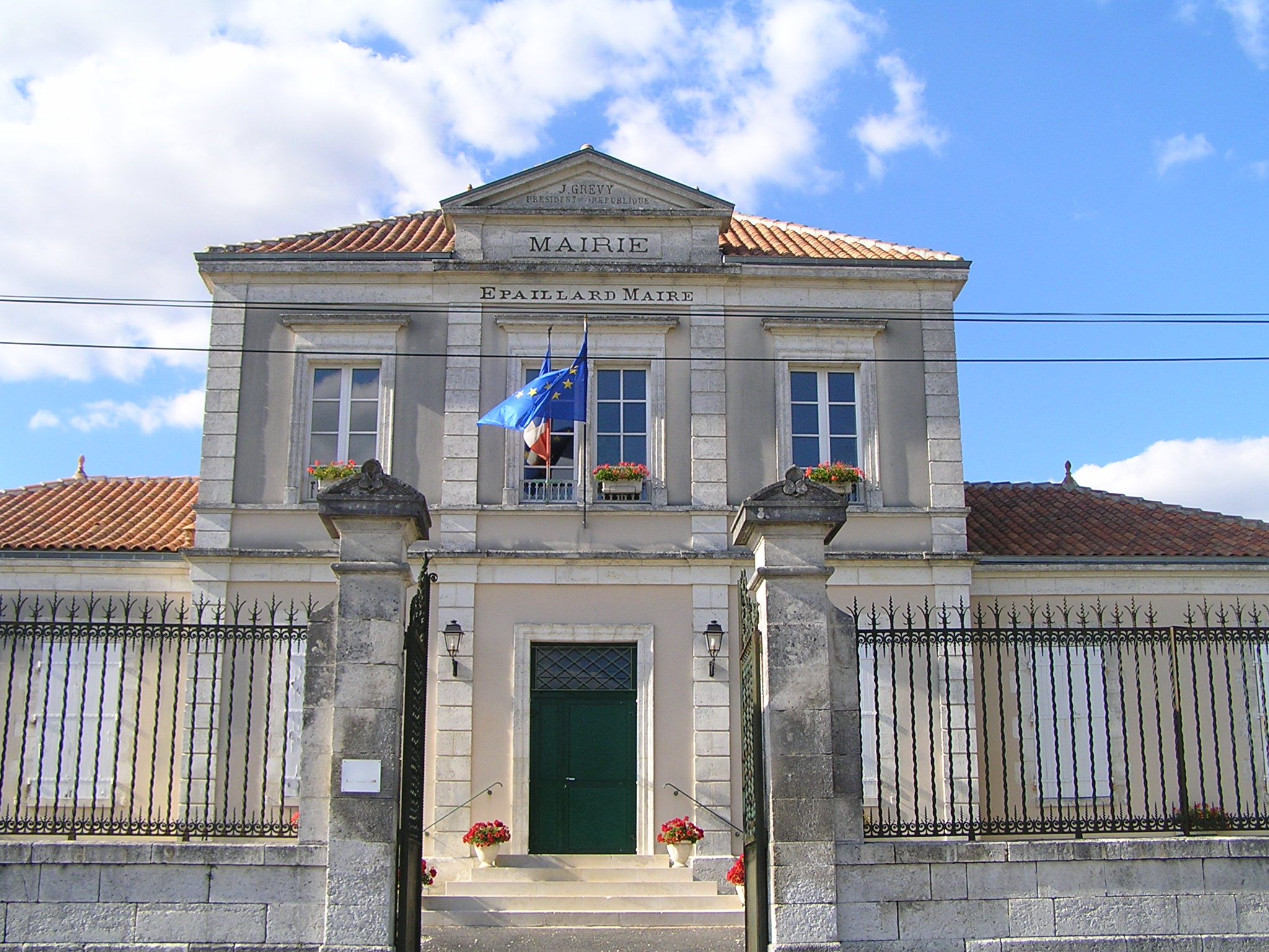 mairie de Saint-Cybardeaux